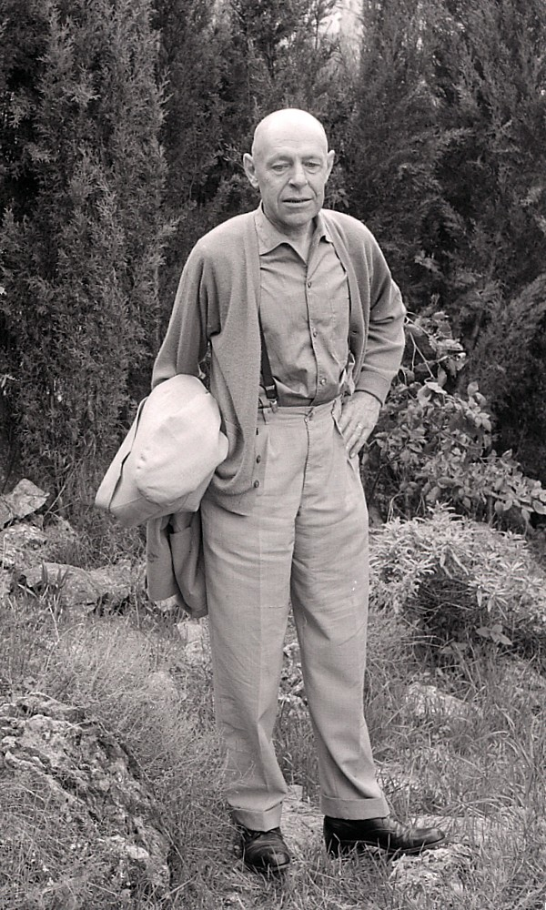 Serie fotografica : Italia, 1960 / Paolo Monti. - Buste: 7, Fototipi: 7 : Negativo b/n, gelatina bromuro d'argento/ pellicola ; 6x6. - ((Serie costituita da 7 negativi identificati con i nn.: R4995-5001. Sulla busta R4995 manoscritto: "1960/ Dubuffet". La suddetta serie è contenuta nella scatola identificata con la numerazione R4953-5160. Sul coperchio della scatola, manoscritto a pennarello: "Ritratti".